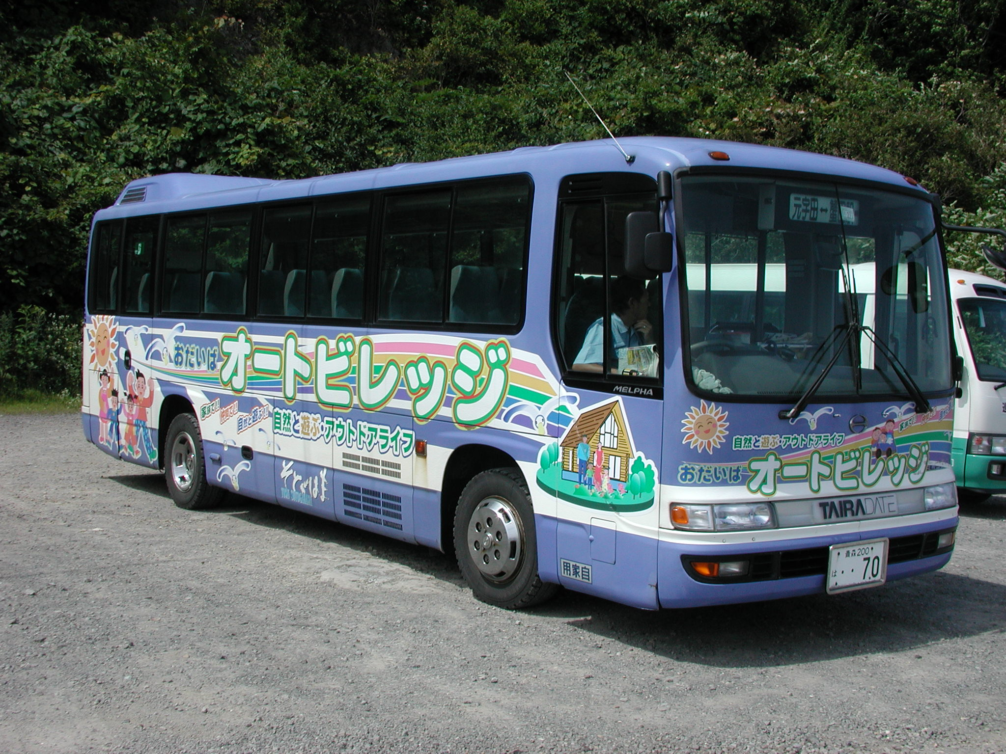 外ヶ浜町平舘地区循環バス車両 - 日野・メルファ 元宇田バス回転場にて